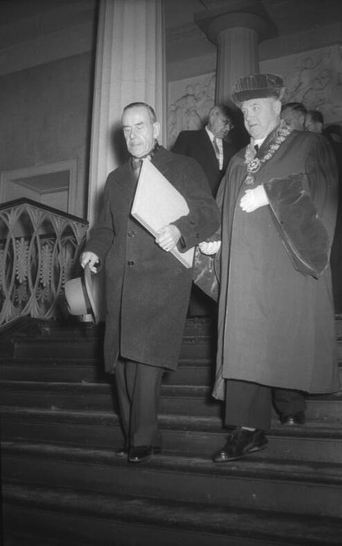 Zentralbild/TBD (Wittig) 16.5.1955 Schiller-Ehrung Weimar 8. bis 15. Mai 1955 15. Mai 1955 Weimar. Ehrenpromotion im Weißen Saal des Schlosses Weimar: Die Friedrich-Schiller-Universität in Jena verlieh in einer Feier dem grossen deutschen Dichter Thomas Mann die Würde eines "doctor honoris causa". UBz.: Thomas Mann verlässt in Begleitung vom Rektor der Friedrich-Schillier-Universität Jena, Prof. Dr.Dr. h.c. Hämel den Weissen Saal.